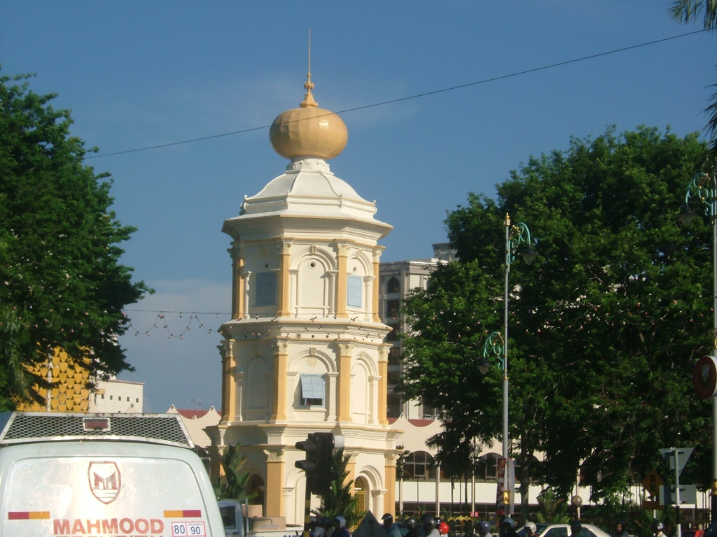 La bildo estas kopiita de en. La originala priskribo estas